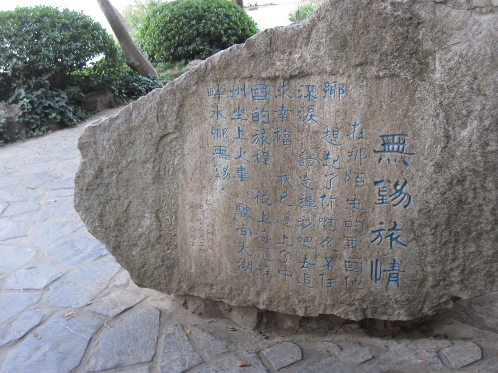 無錫太湖畔，日本民謡「無錫旅情」石碑